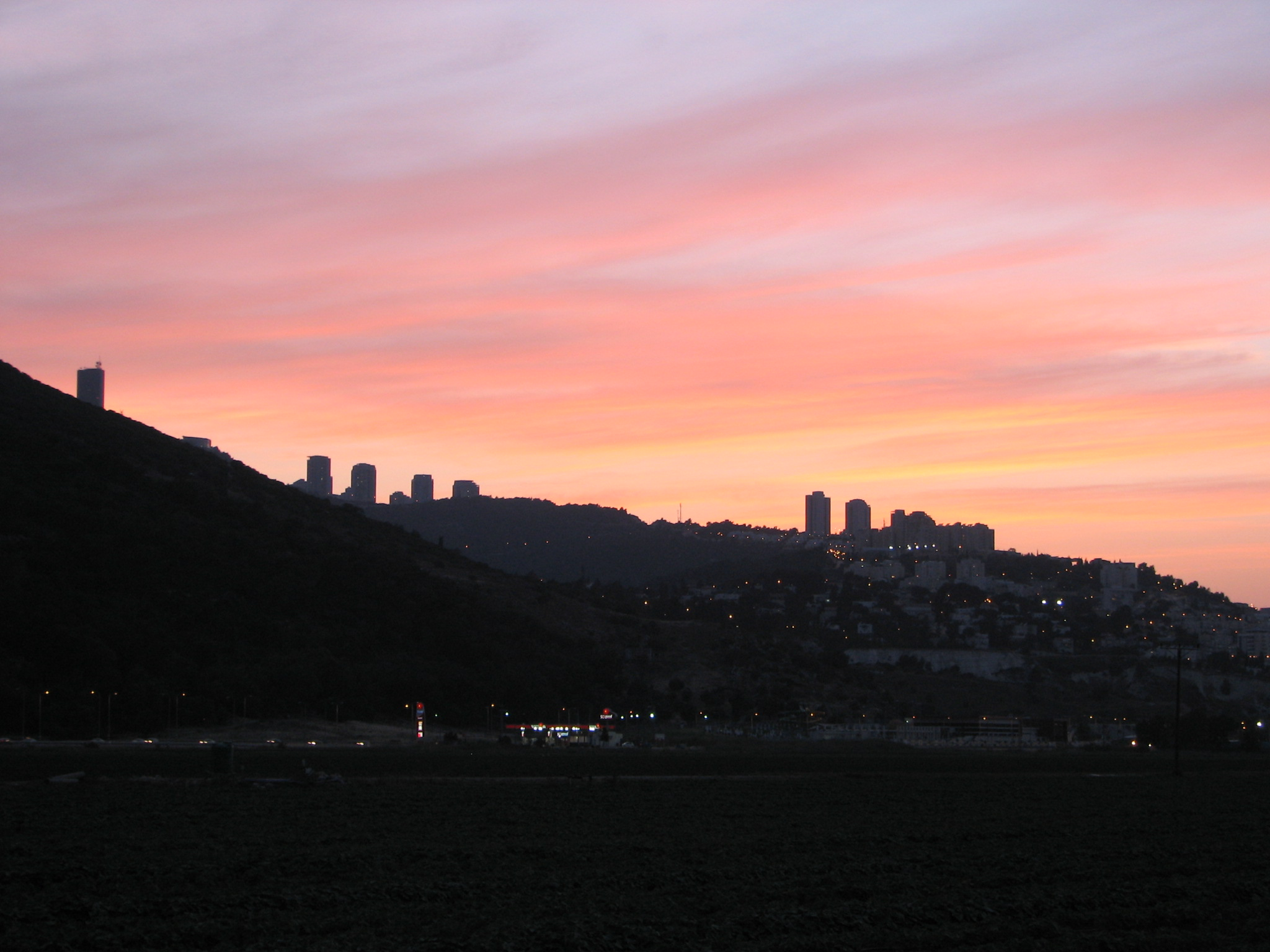 Nesher Nesher at sunset צילומי שקיעה על העיר נשר מבט מכוון צומת יגור בעמק זבולון